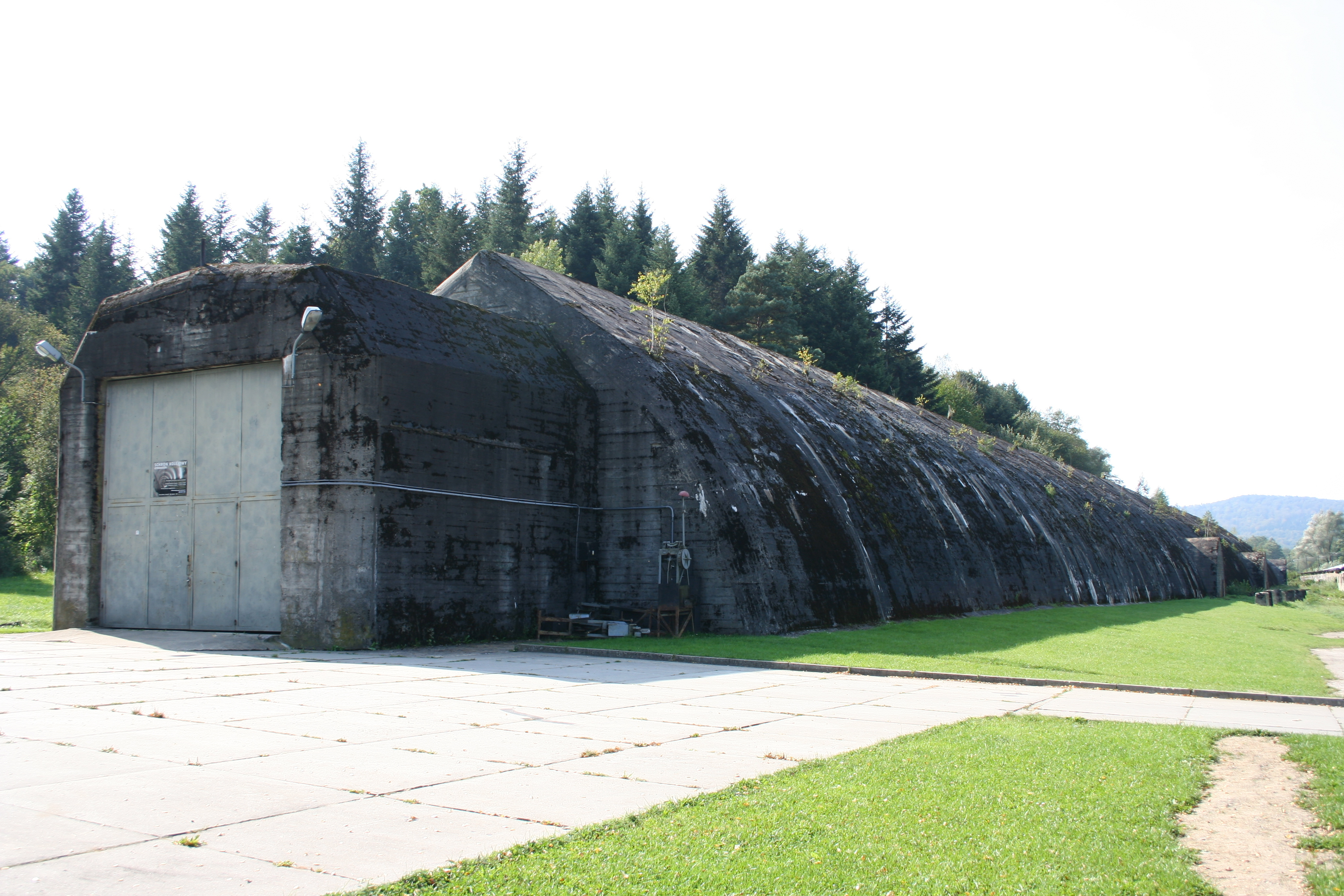 Stępina - schron tunelowy dla pociągu sztabowego, 1940–1941